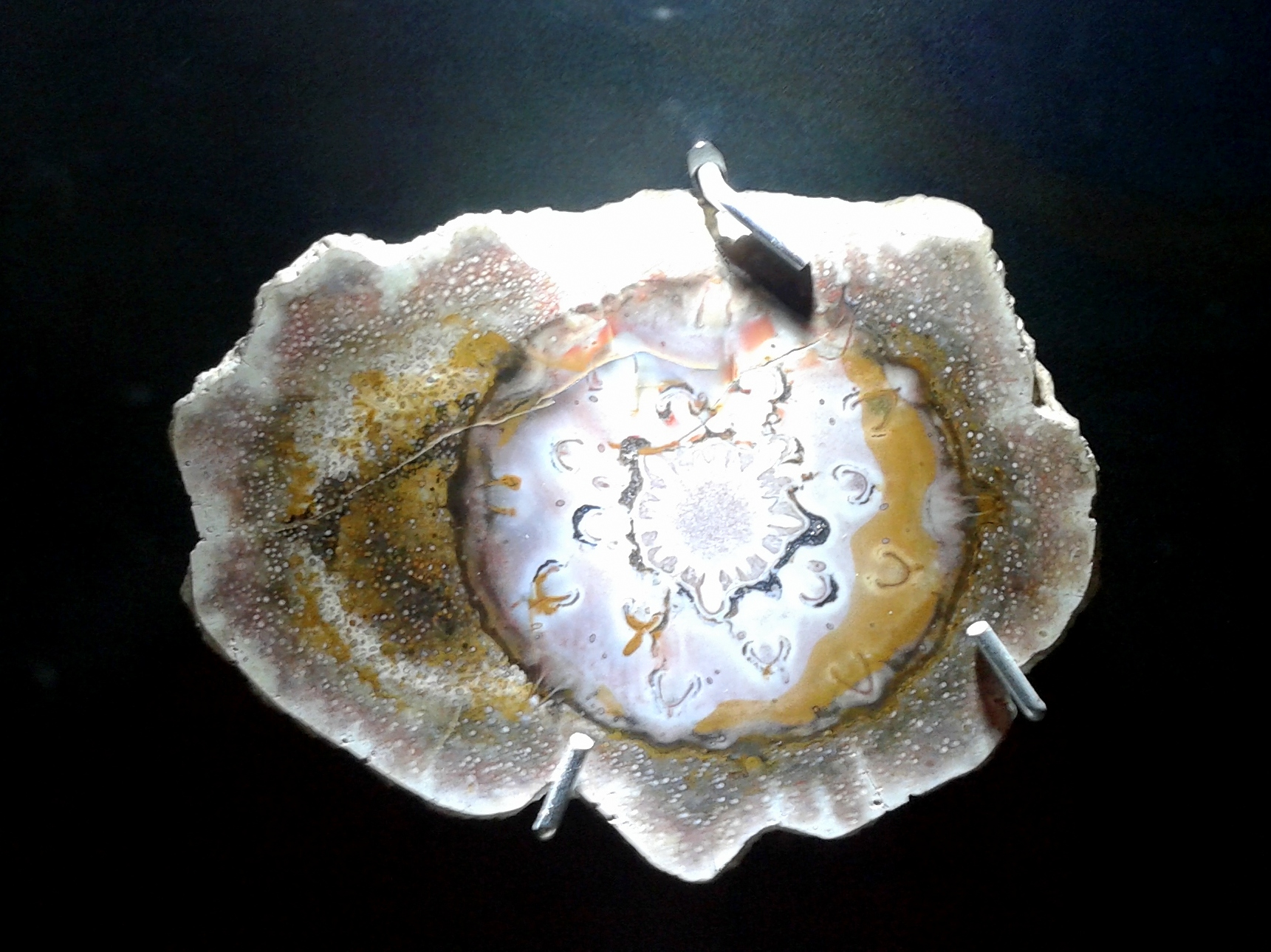 Português do Brasil: Caule petrificado de uma pteridófita (samambaia) extinta (Guairea brasiliensis). O colorido deve-se aos diferentes minerais que substituíram os tecidos orgânicos da planta. Acervo do Museu Nacional/UFRJ, Rio de Janeiro, Brasil.